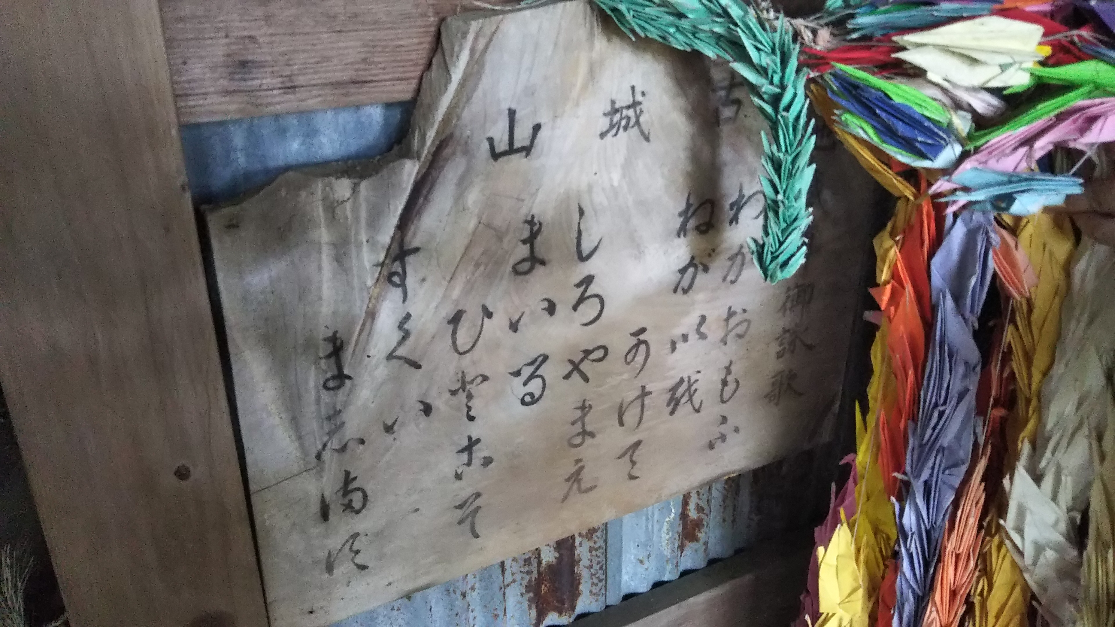 栗栖野城地蔵堂にある古城歌